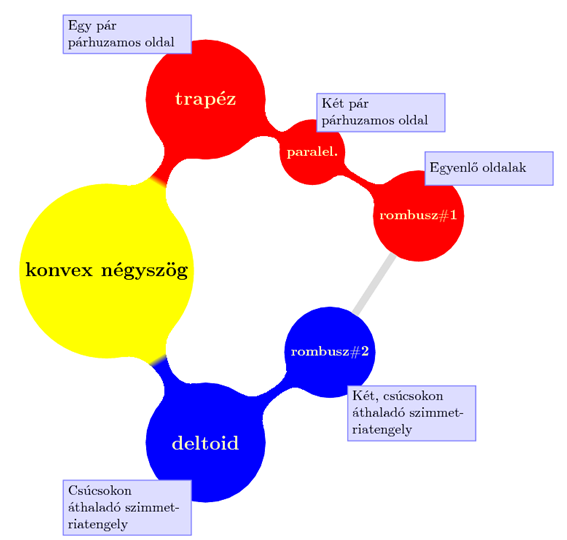 A kép fogalmak intenzionális és exenzionális kapcsolatát szándékozik ábrázolni. Készült LaTeX-ben, TikZ csomaggal, png-vé konvertálva